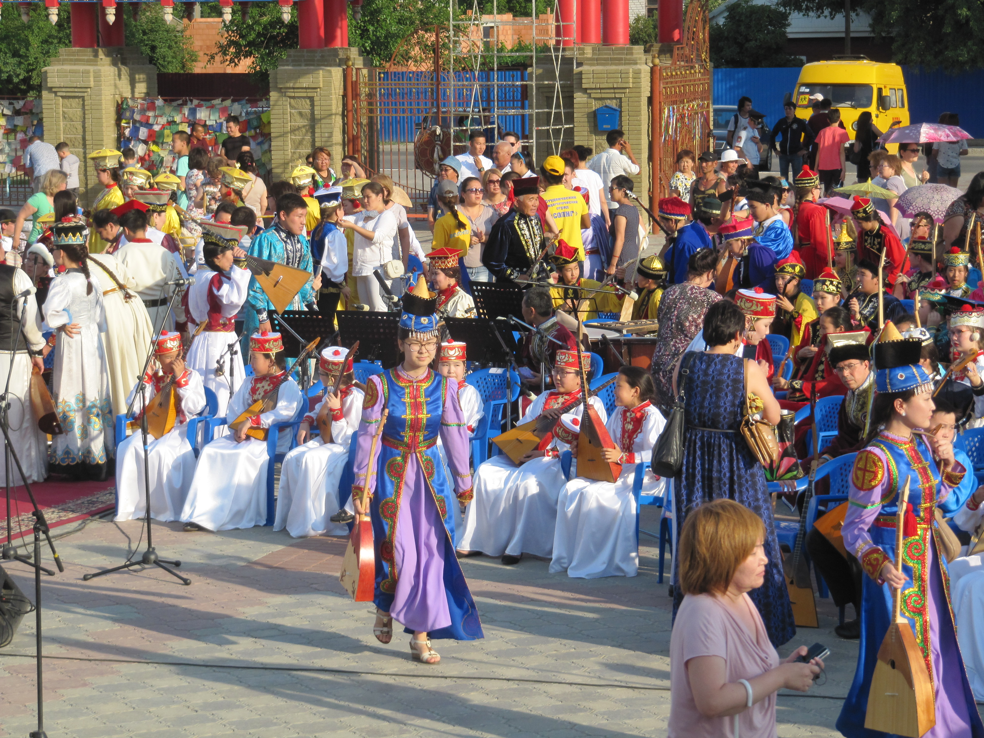 Во время репетиции сводного оркестра домбристов в Элисте